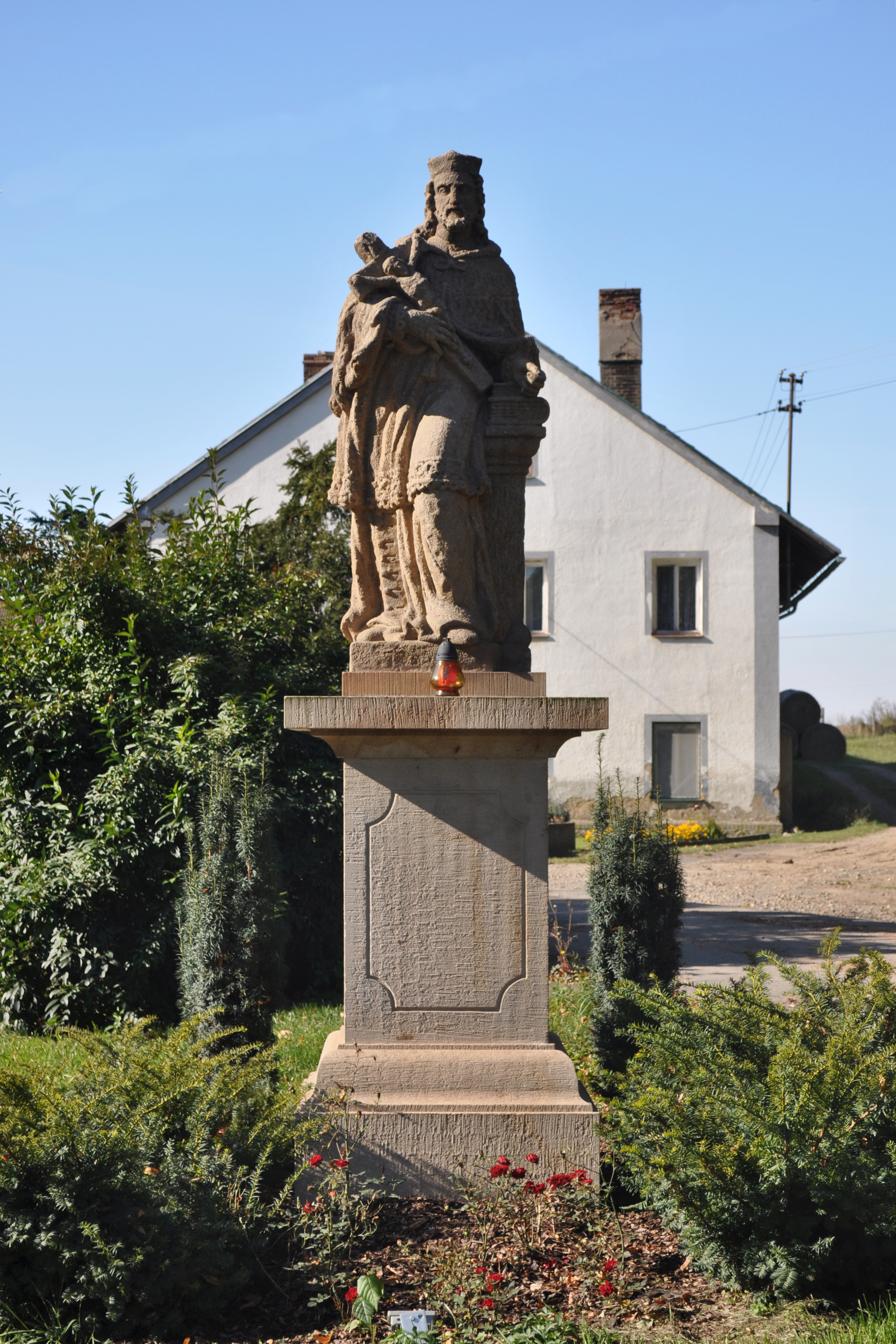 Socha sv. Jana Nepomuckého, Šípy